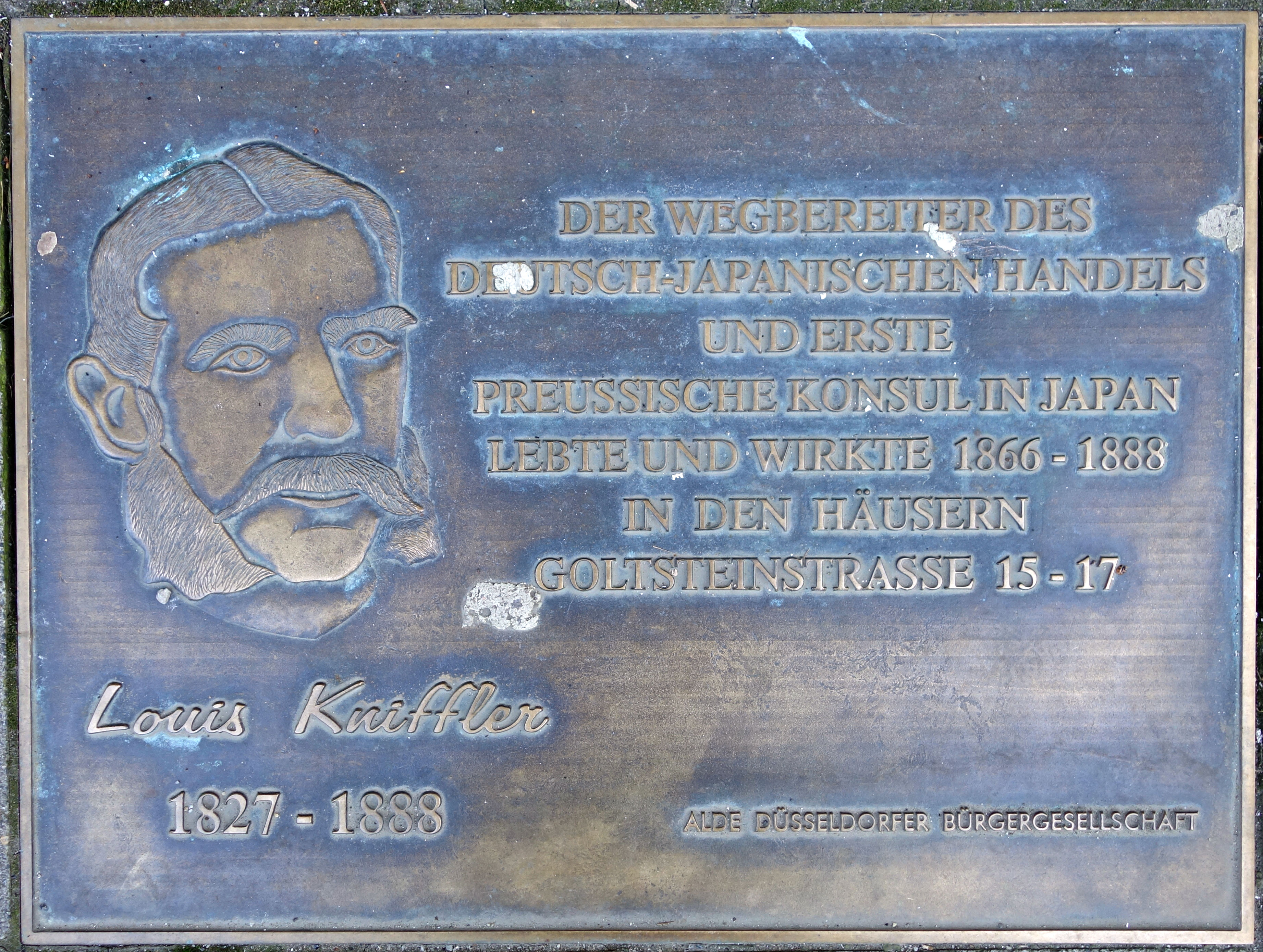 Louis Kniffler (1827-1888). Der Wegbereiter des Deutsch-Japanischen Handels und erste preussische Konsul in Japan lebte und wirkte 1866-1888 in den Häusern Goltsteinstrasse 15-17. Bodenplatte in Düsseldorf vor dem Haus Goltsteinstraße 15, gestiftet von dem Heimatverein Alde Düsseldorfer Bürgergesellschaft. Eine weitere Gedenktafel befindet sich auf der Plaza des Deutsch-Japanischen Centers an der Immermannstraße.